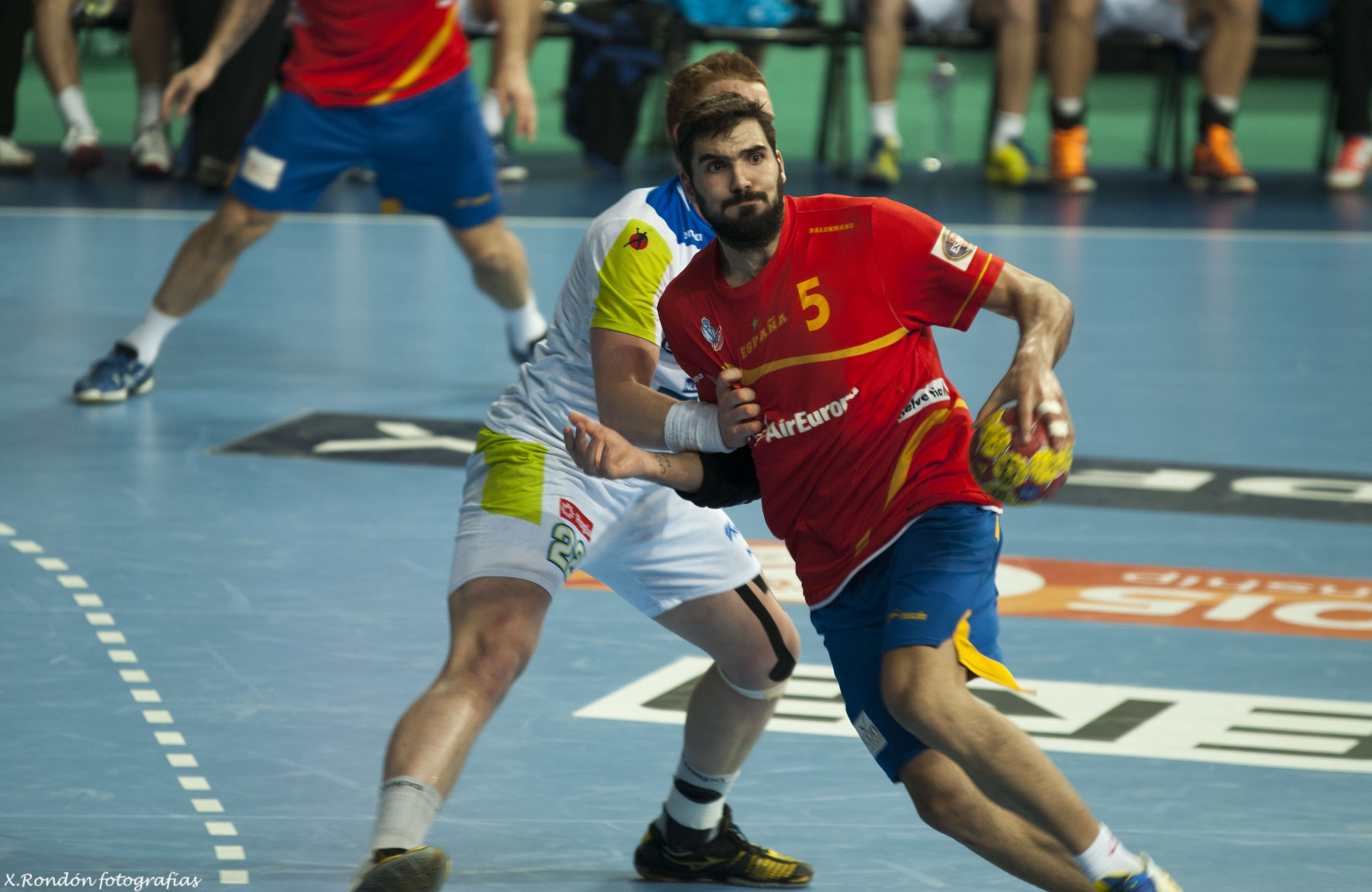 España-Eslovenia